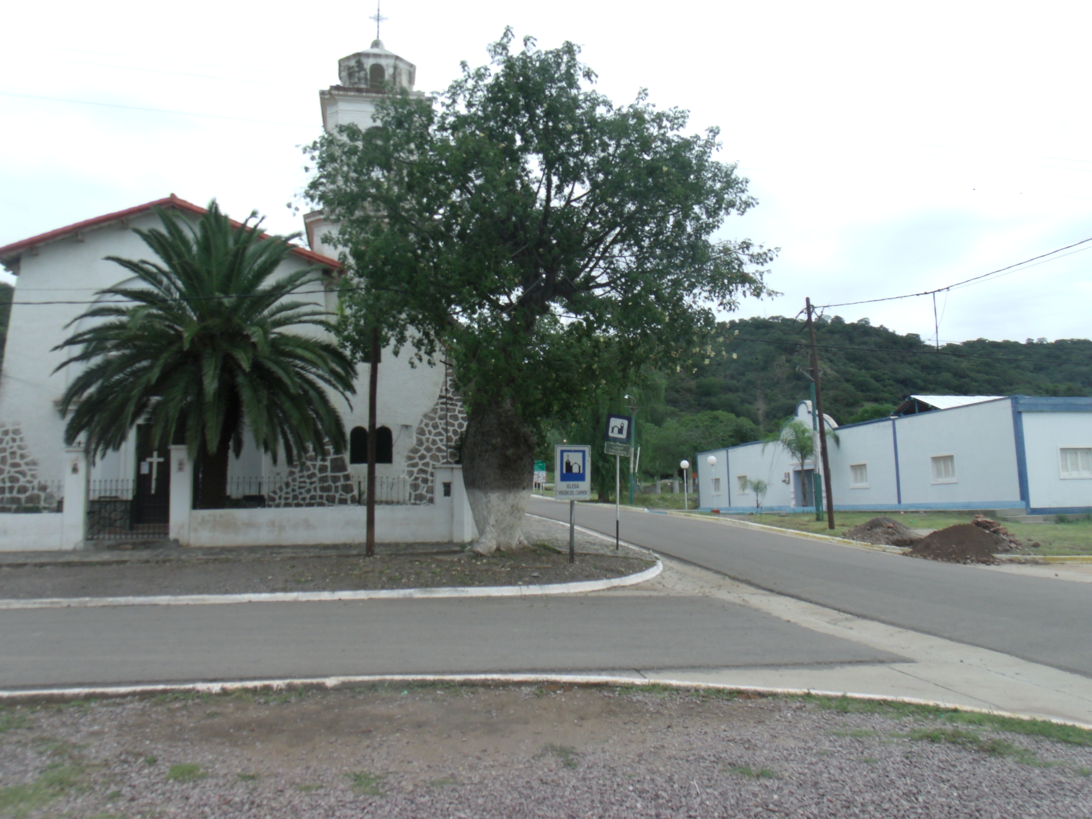 Templo católico de Villa La Punta y al fondo las sierras de Guasayán.